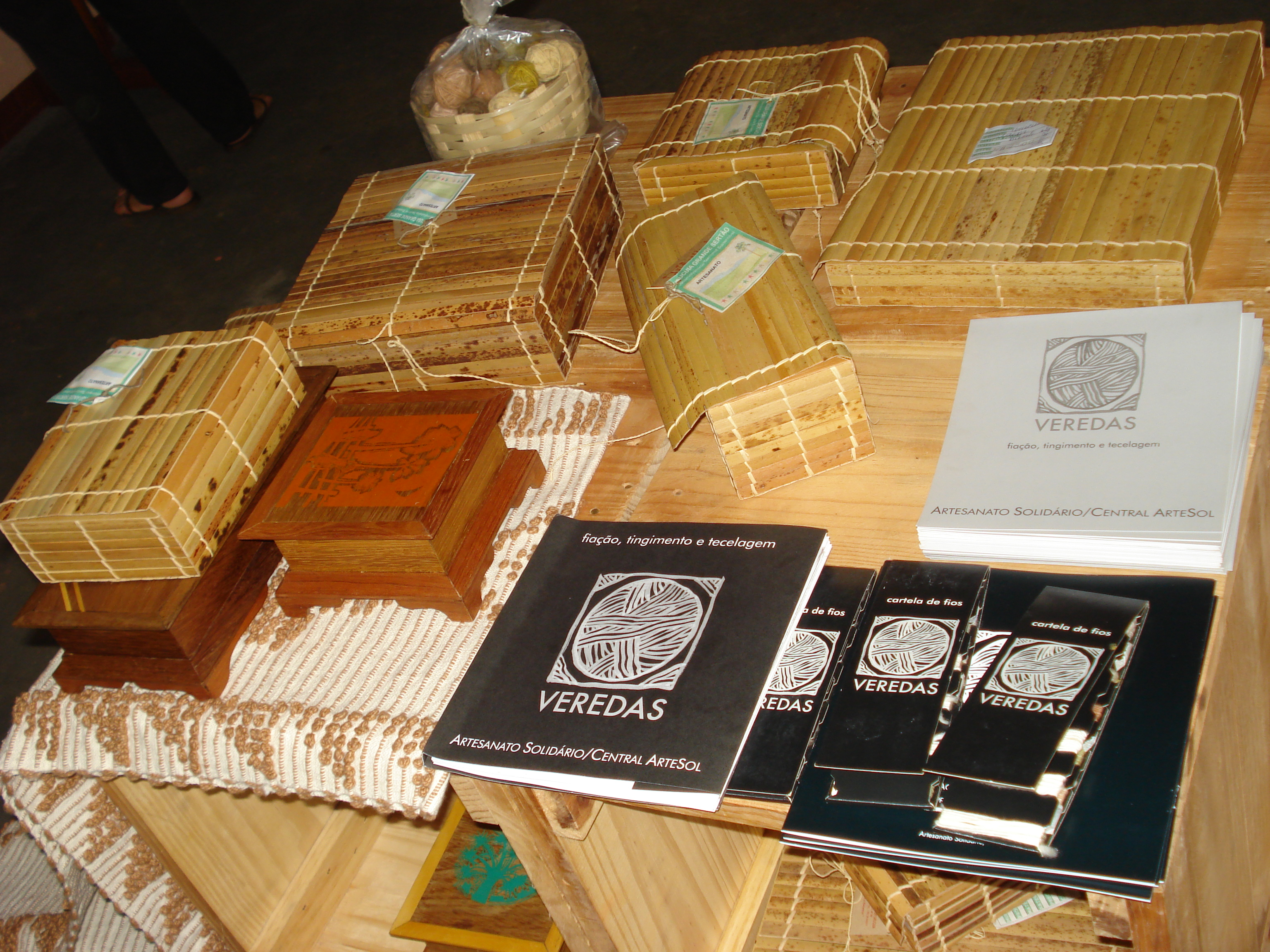 Artesanato feito em Urucuia e Exportado para todo o mundo.